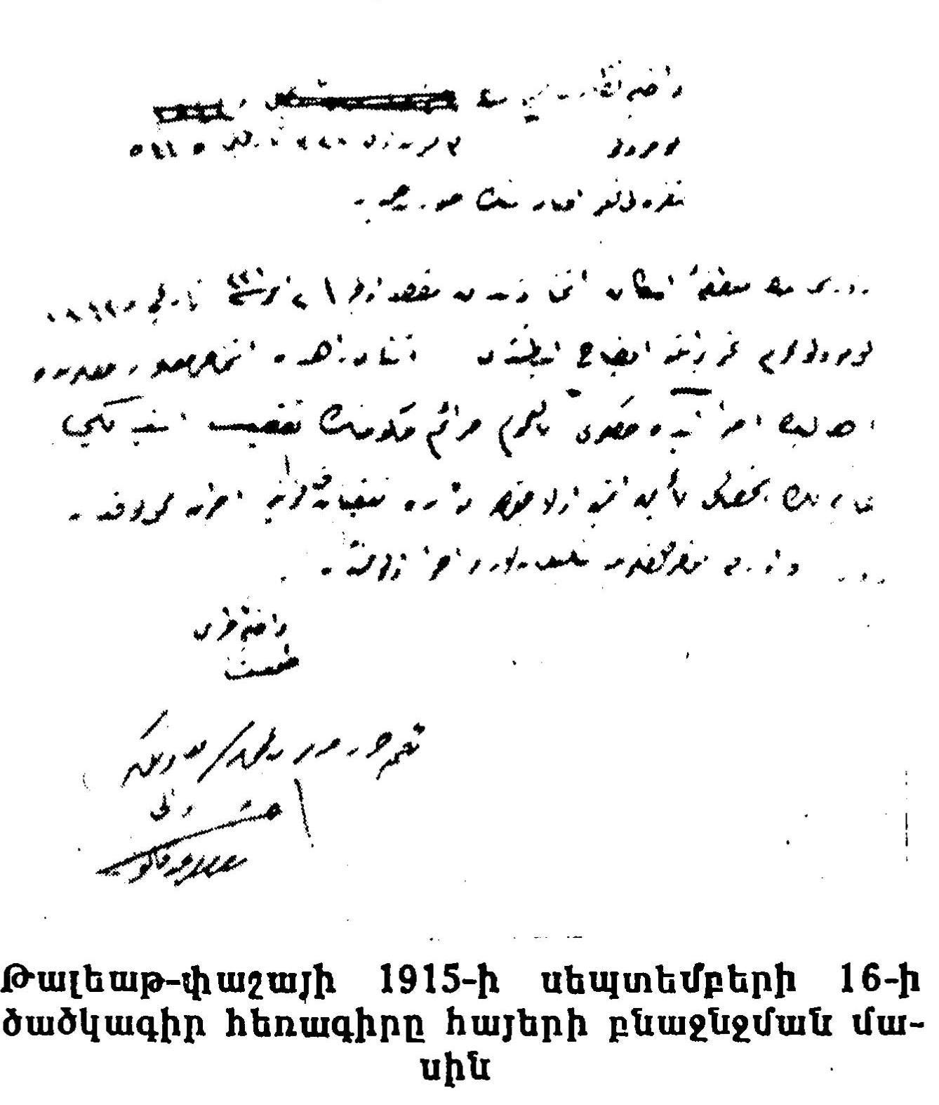 Թալեաթ փաշայի 1915 թվականի սեպտեմբերի 16-ի ծածկագիր հեռագիրը հայերի բնաջնջման մասին